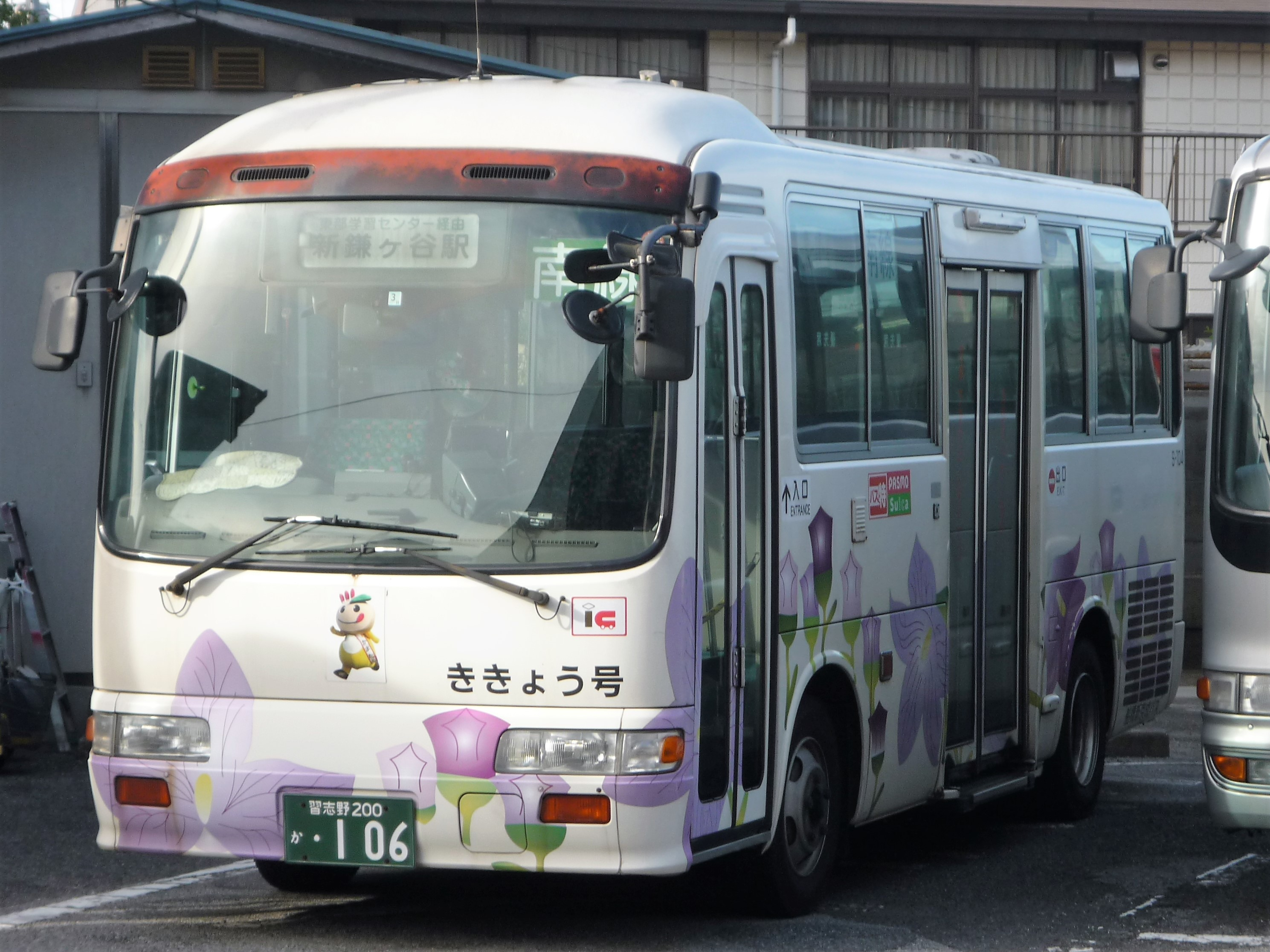 鎌ヶ谷市コミュニティバス「ききょう号」南線に運用される船橋新京成バス（鎌ヶ谷営業所にて）